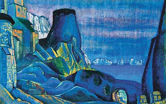 По заказу Московской частной оперы С.И. Зимина он создаёт (1912) около 30 эскизов декораций и костюмов для вагнеровской оперы "Тристан и Изольда".